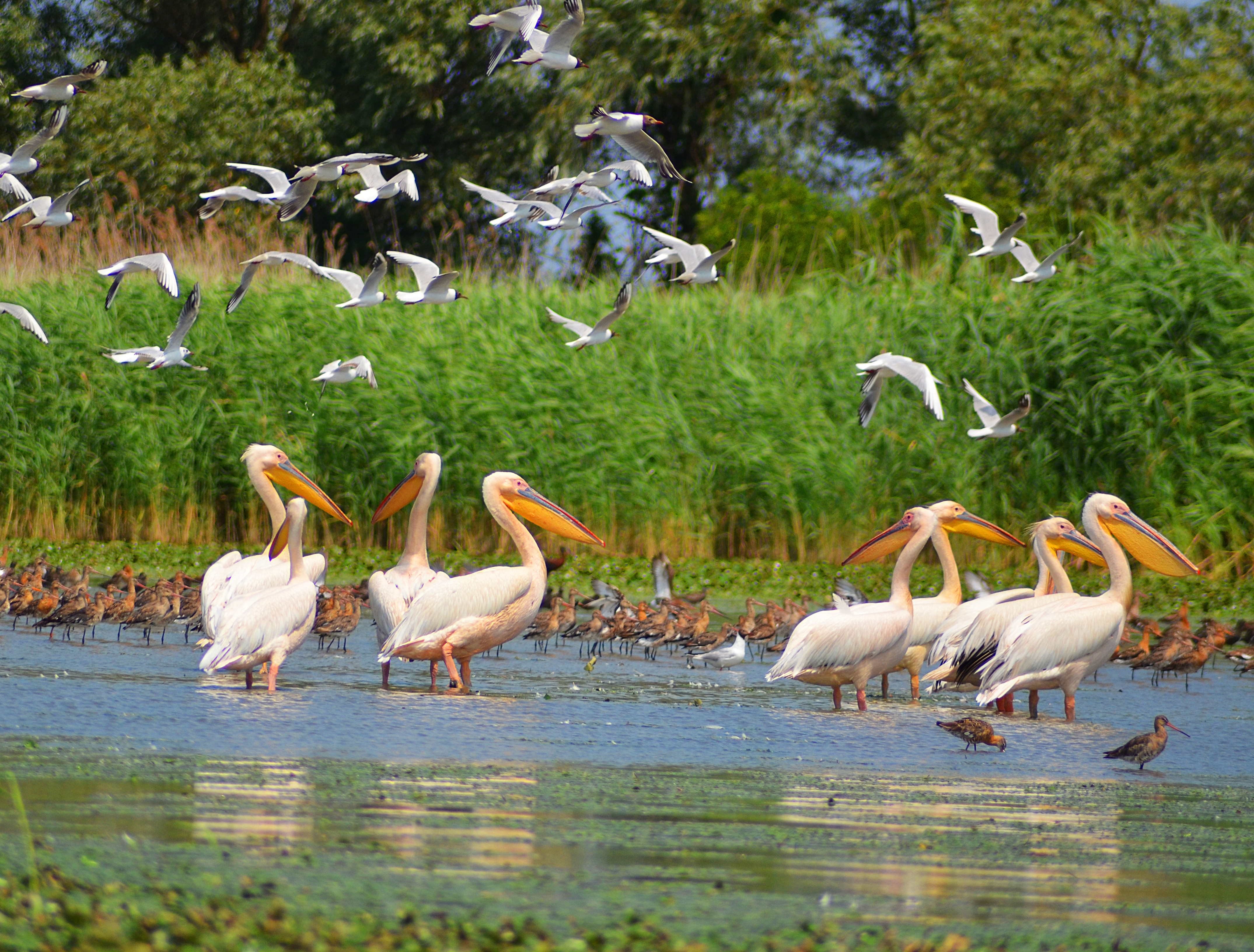 Дунайський біосферний заповідник, Кілійський р-н, м. Вилкове, вул. Татарбунарського повстання, 132 а